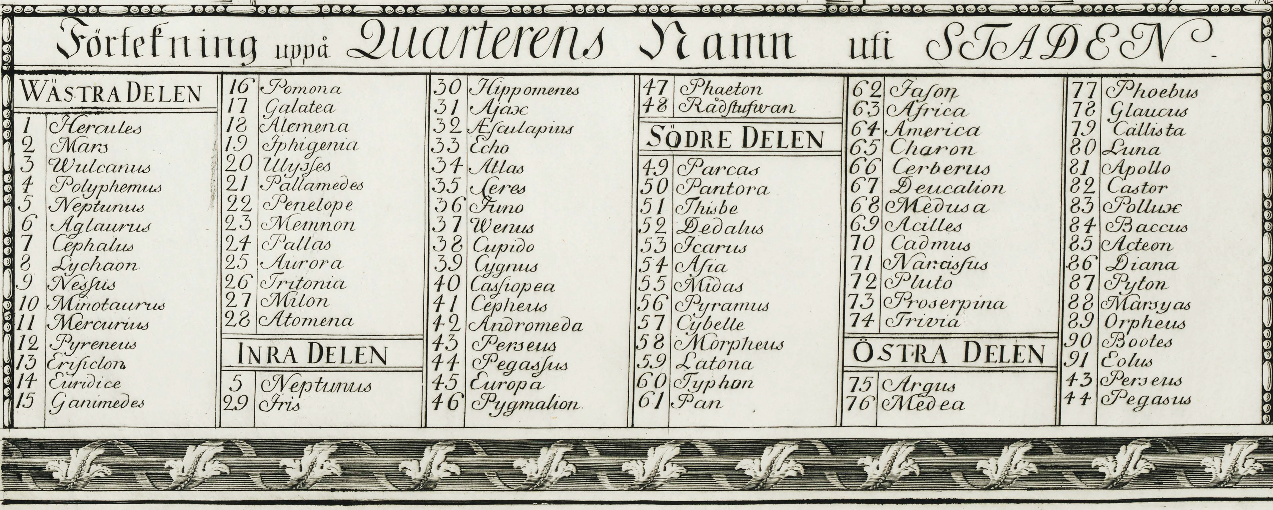 Petrus Tillaeus kvartersnamn i "Staden" (Gamla stan) från 1733